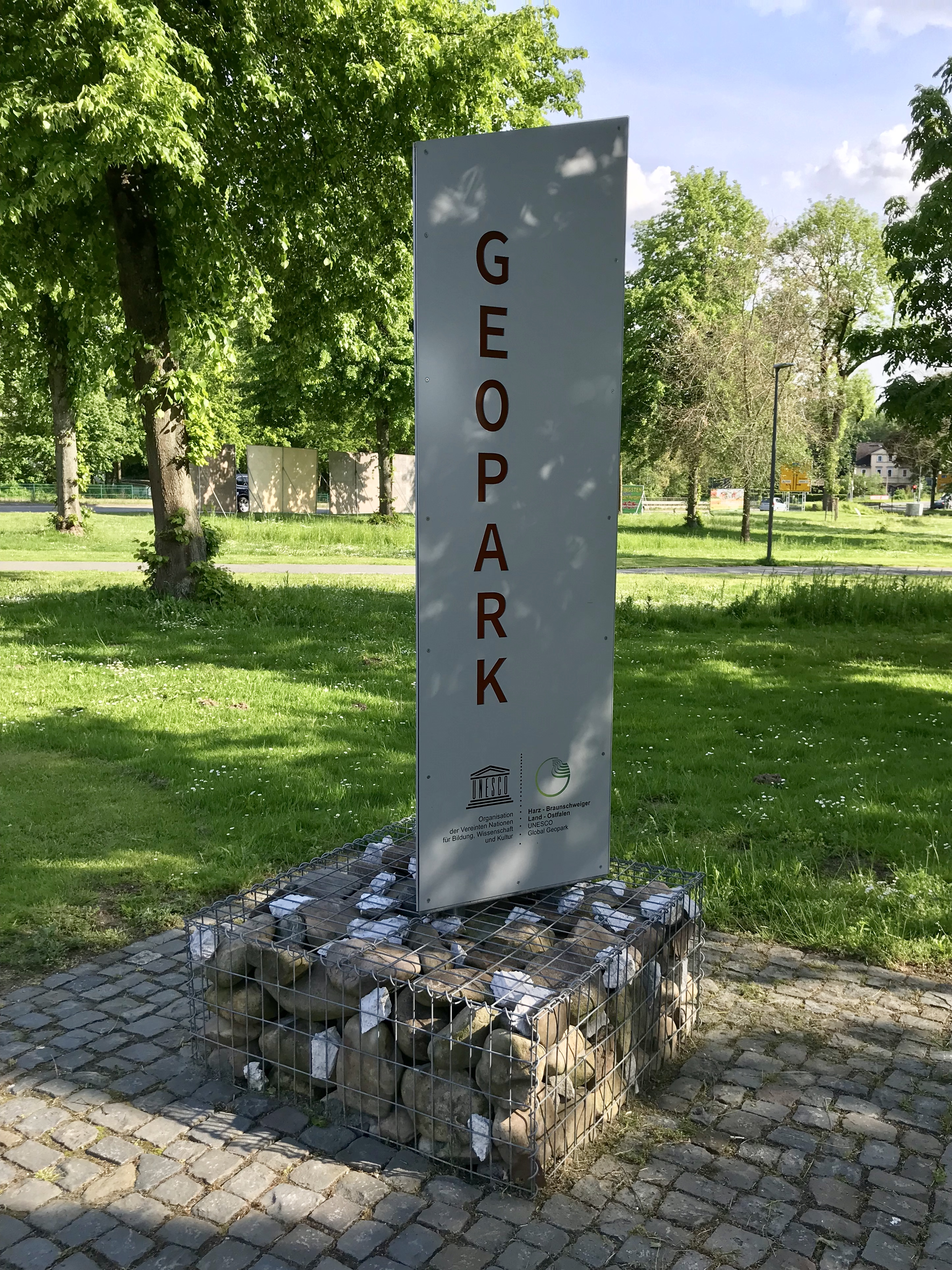 Eine Stele des Geopark Harz zur Information der Landmarke und der Sösekiesel in Osterode am Harz